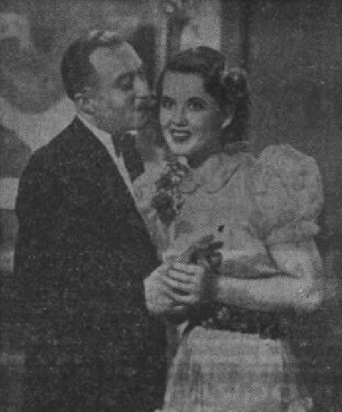 Nancy Rubensová (1915-1994), česká herečka